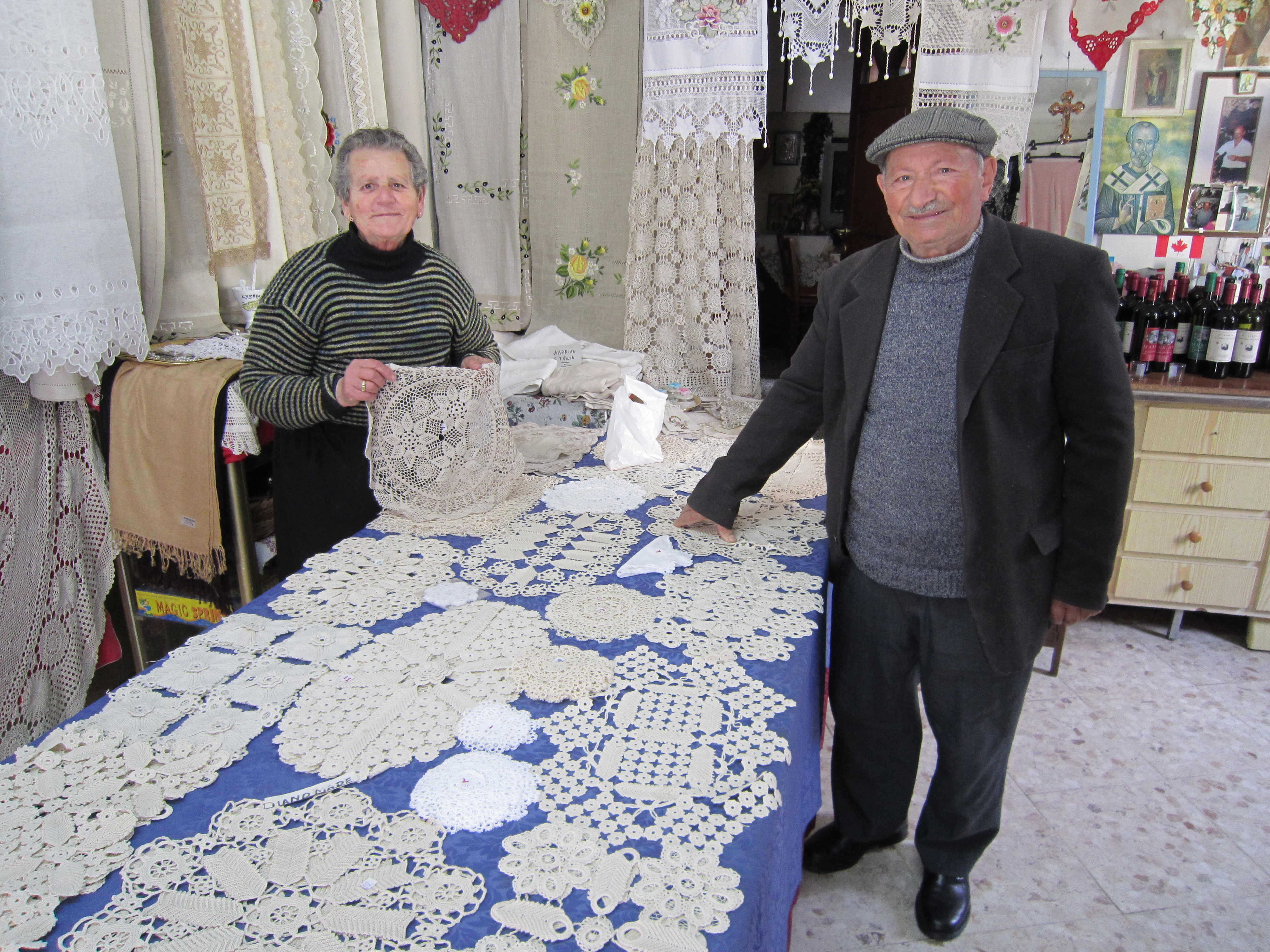 Cyprus - Omodos 2